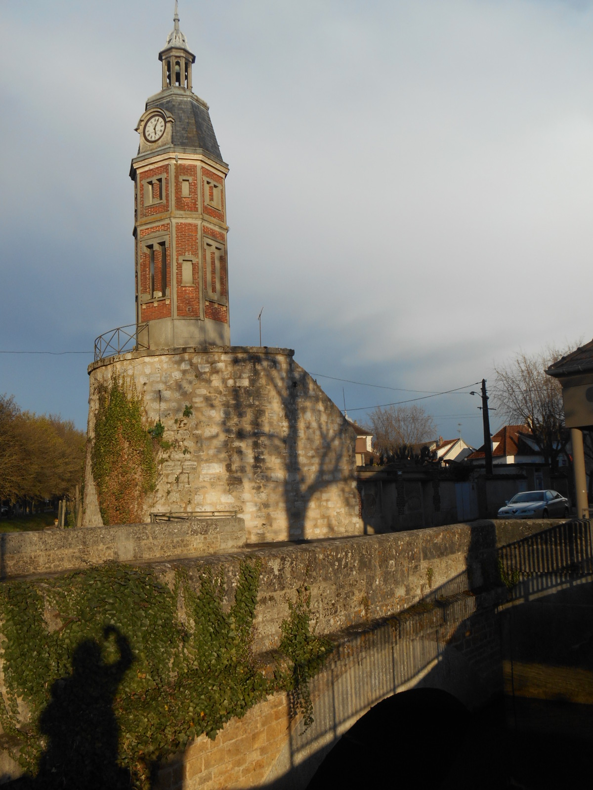 Beffroi, à Crécy-la-Chapelle (77)